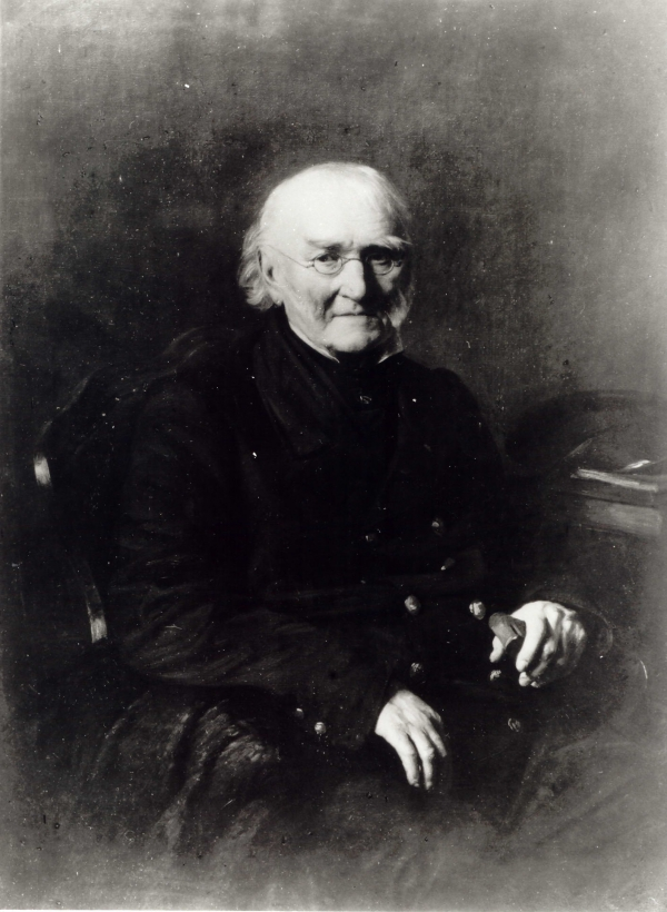 Portret Piotra hr. Łubieńskiego Olej na płótnie